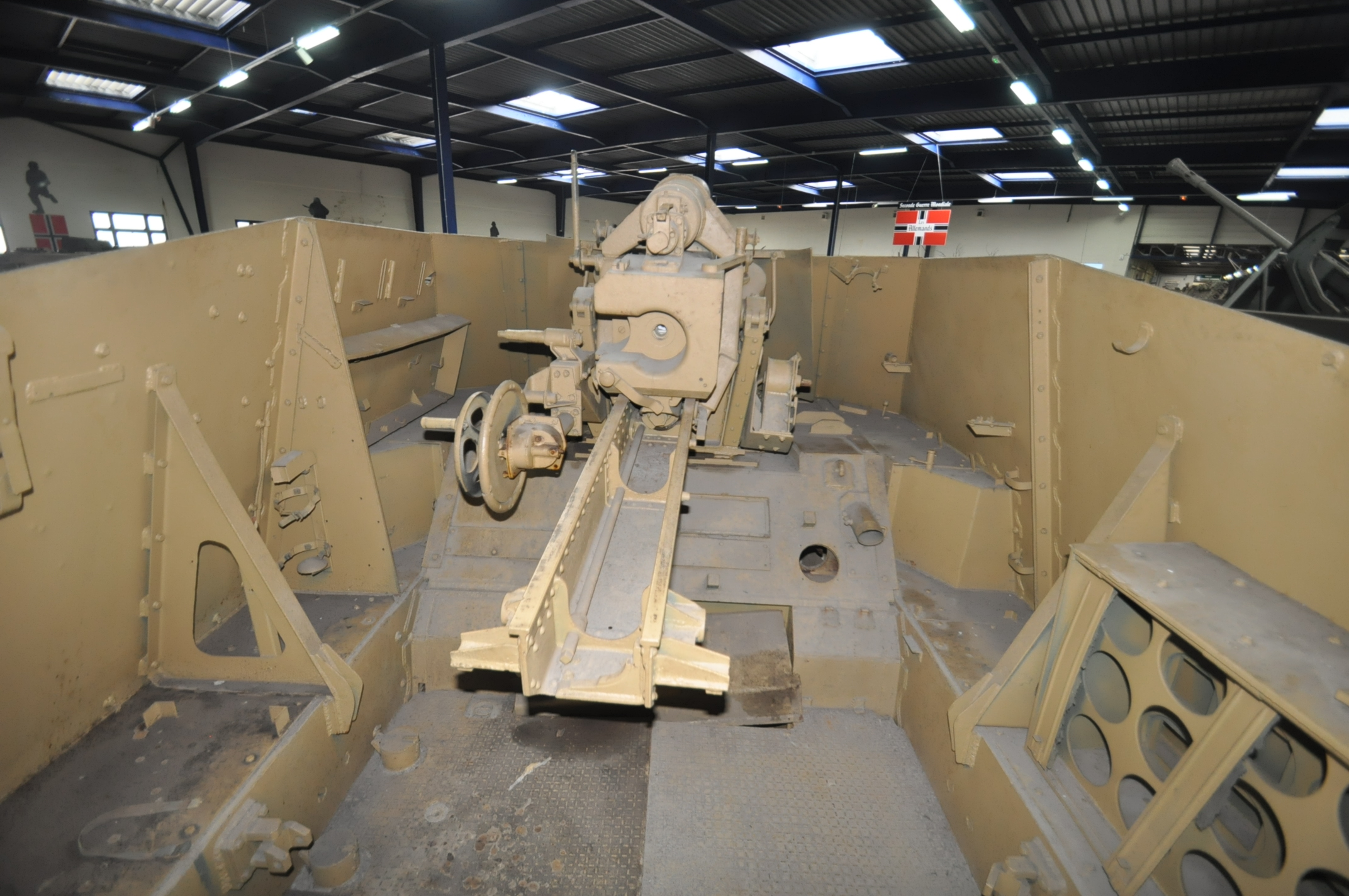 自走砲「フンメル」戦闘室